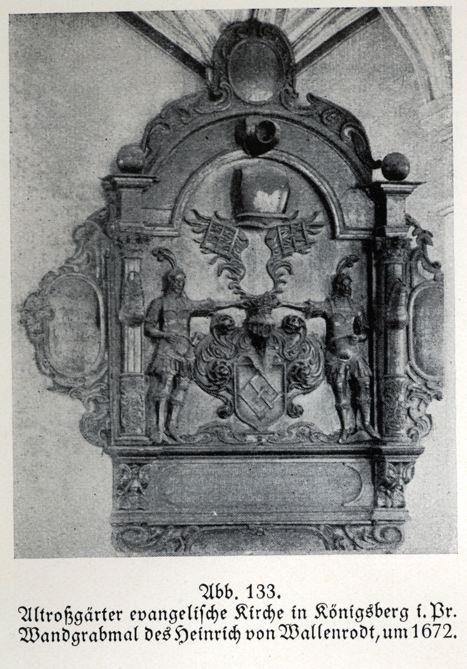 Königsberg, Altroßgärter Kirche, Wandgrabmal des Heinrich v. Wallenrodt, 1672